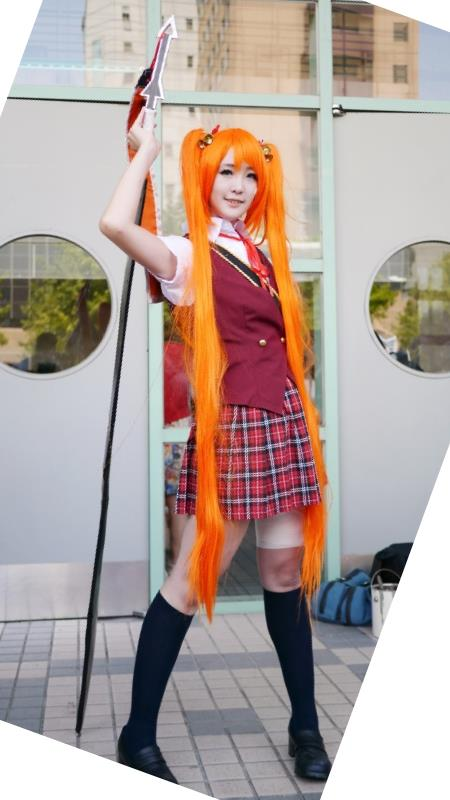 第24屆開拓動漫祭，《魔法老師》神樂坂明日菜cosplayer。